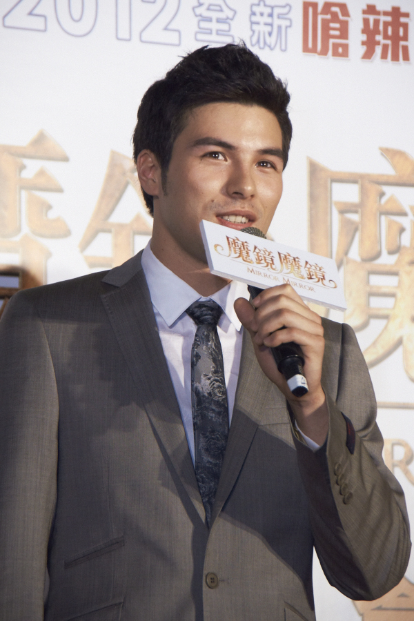 台灣混血藝人鳳小岳